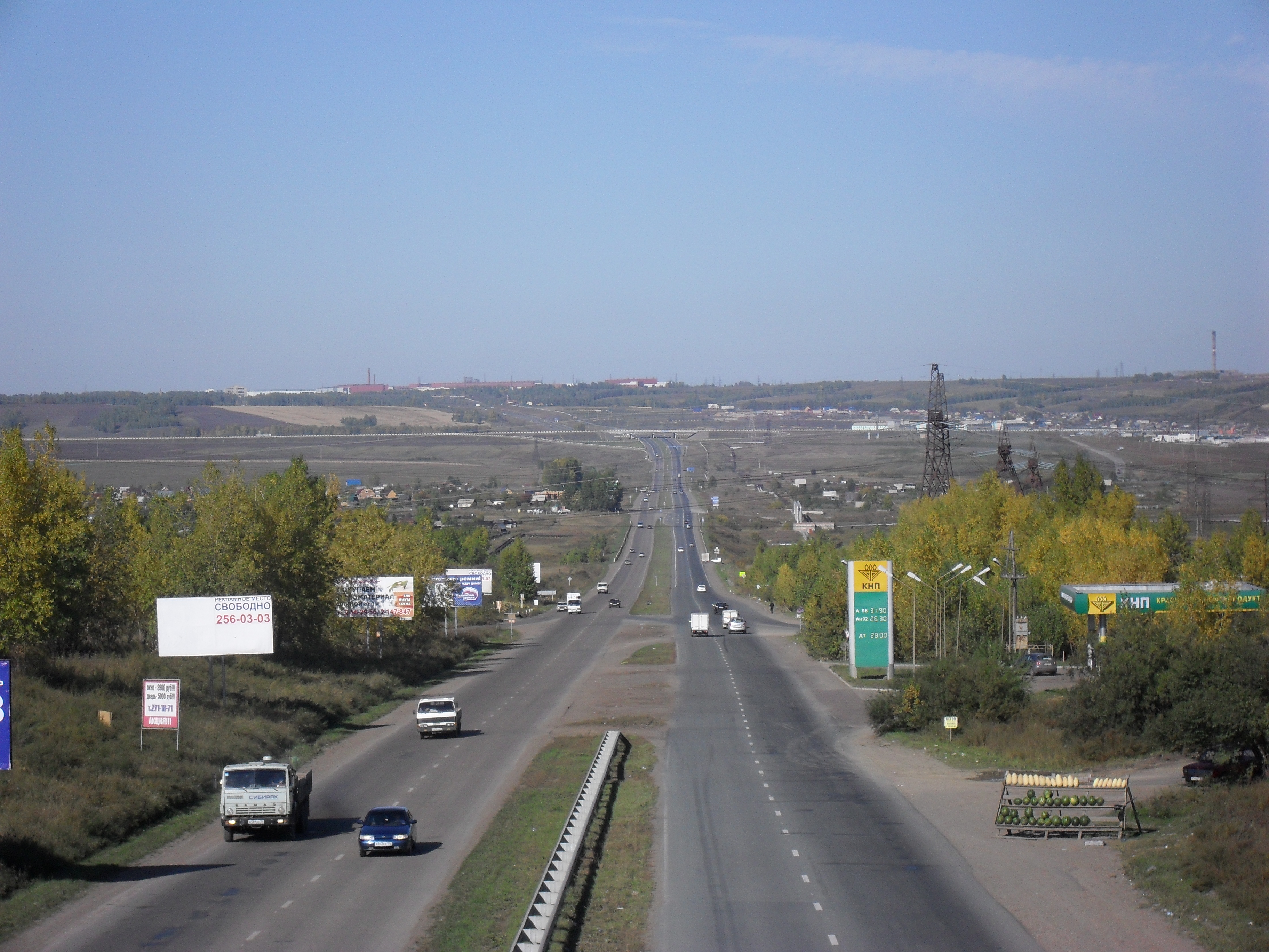 10-й км Енисейского тракта, вид с путепровода в мкрн Солнечный